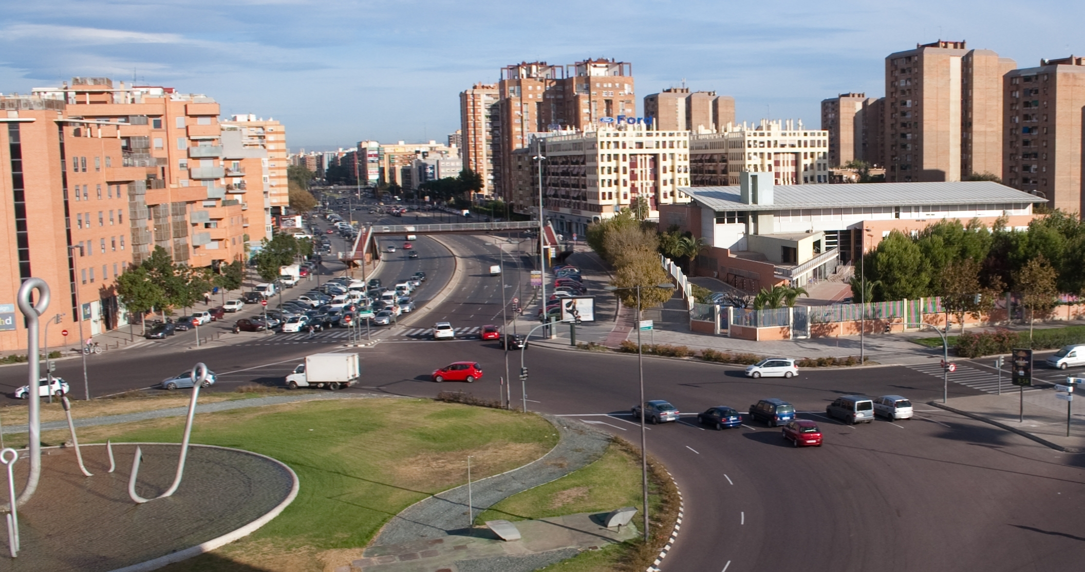 CIPFP Ausiàs March (Valencia). Vista desde Hotel Holiday Inn Express Valencia